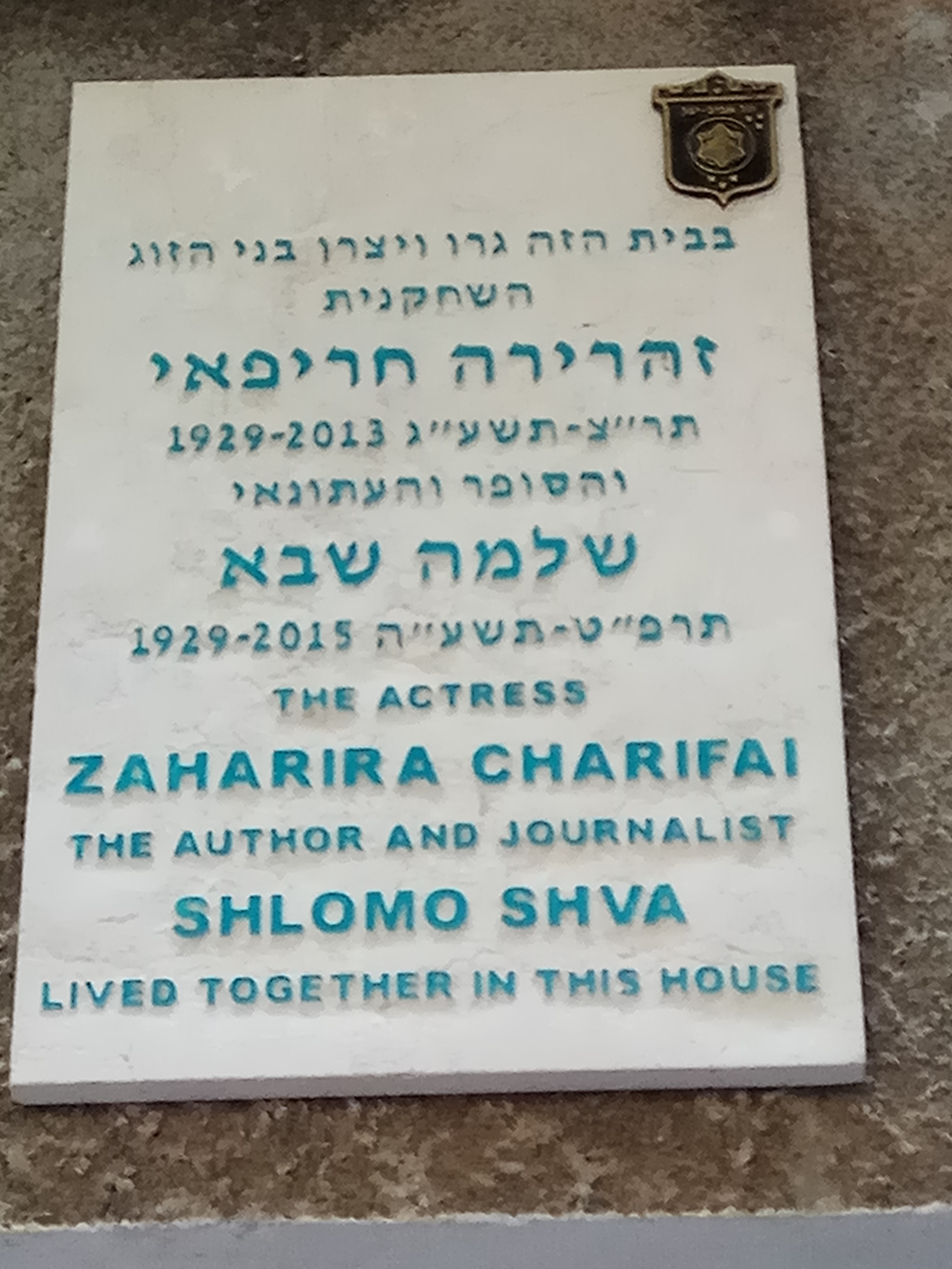 לוחית זיכרון משותפת לזהרירה חריפאי ושלמה שבא ברחוב זכריה 14 בתל אביב.